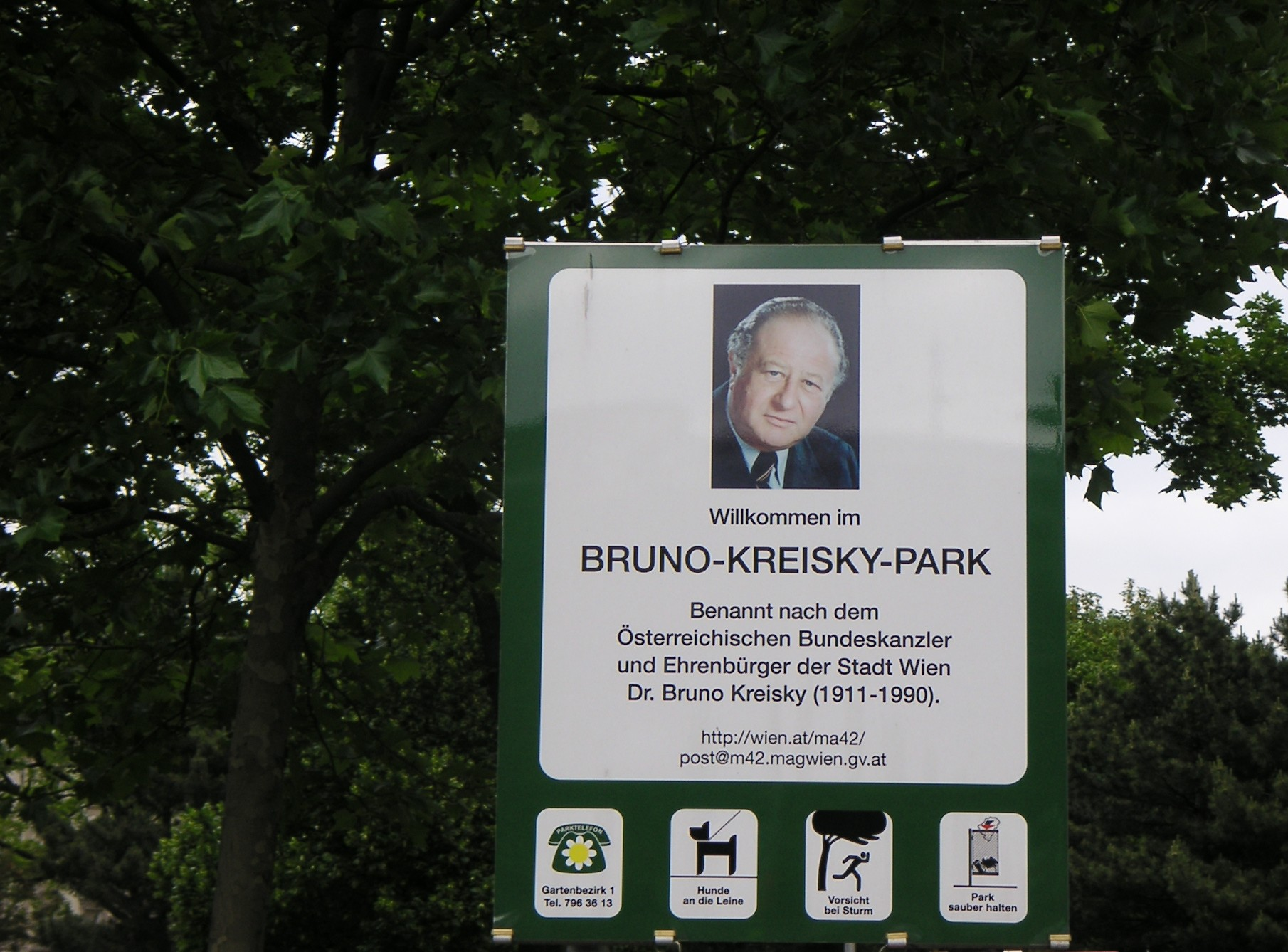 Tafel am Eingang zum Bruno Kreisky Park in Wien